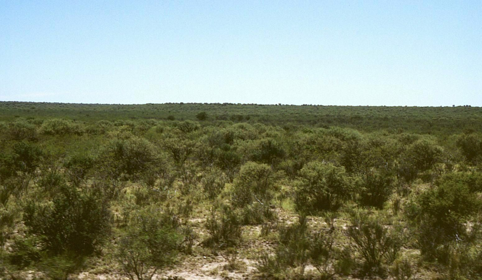 Vegetation des Monte - Argentinien/Argentina, W Balde, bei/cerca de/next to Chosmes, Prov. San Luis.